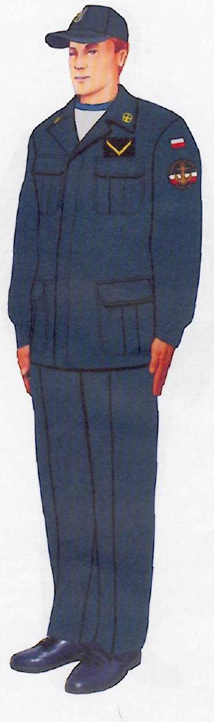 Umundurowanie ćwiczebne podchorążego Marynarki Wojennej